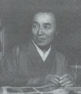 読売新聞社出版局『家庭よみうり』(1953年6月)、「私の顔 代議士」より奥むめお